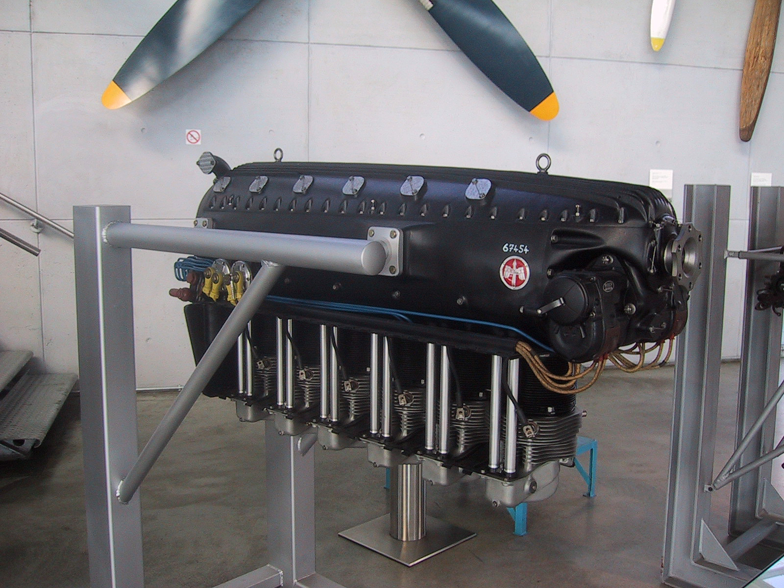 Argus As 17a Aircraft Engine, Deutches Museum